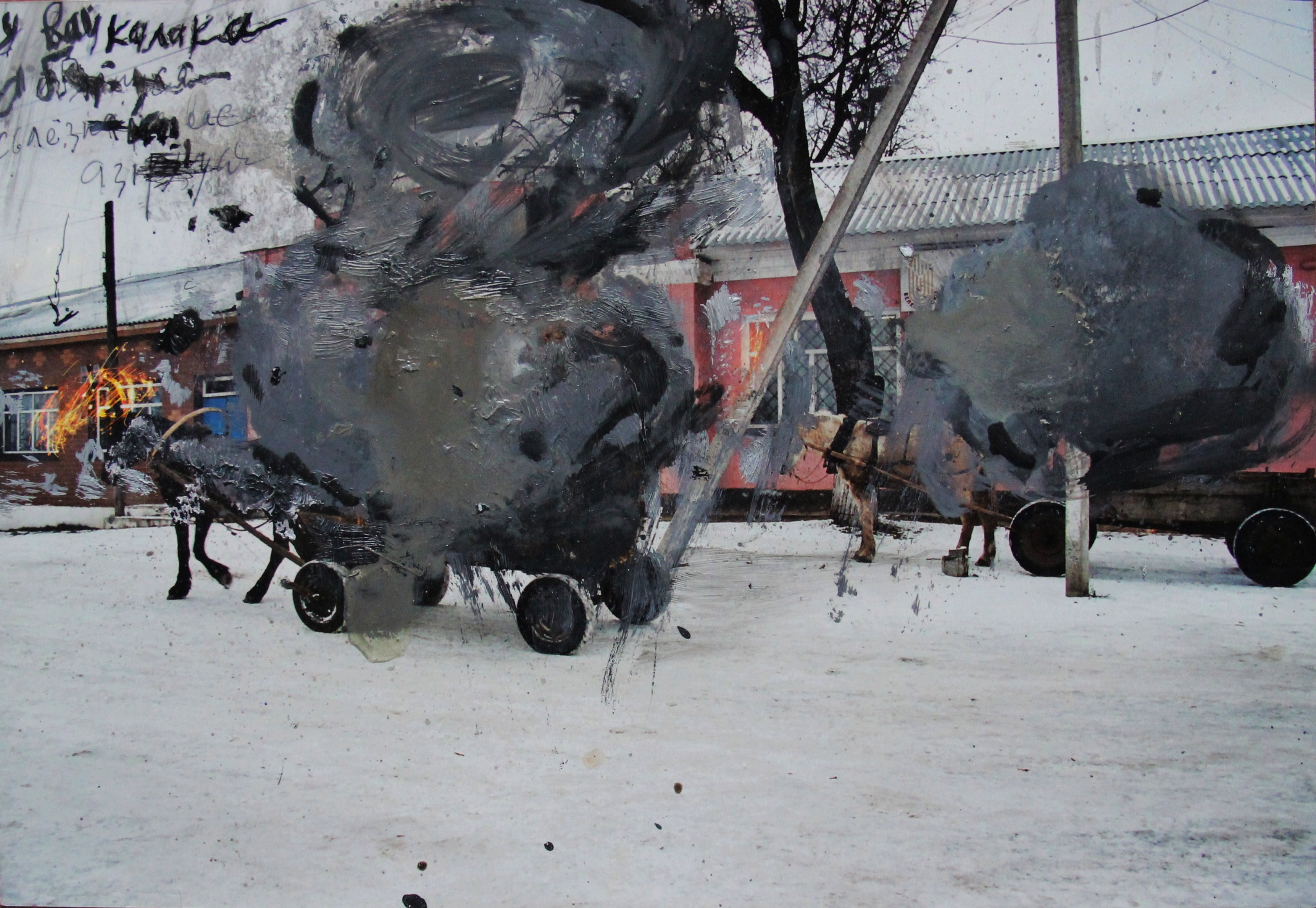 Художник Игорь Тишин. "Скетч", 2007.